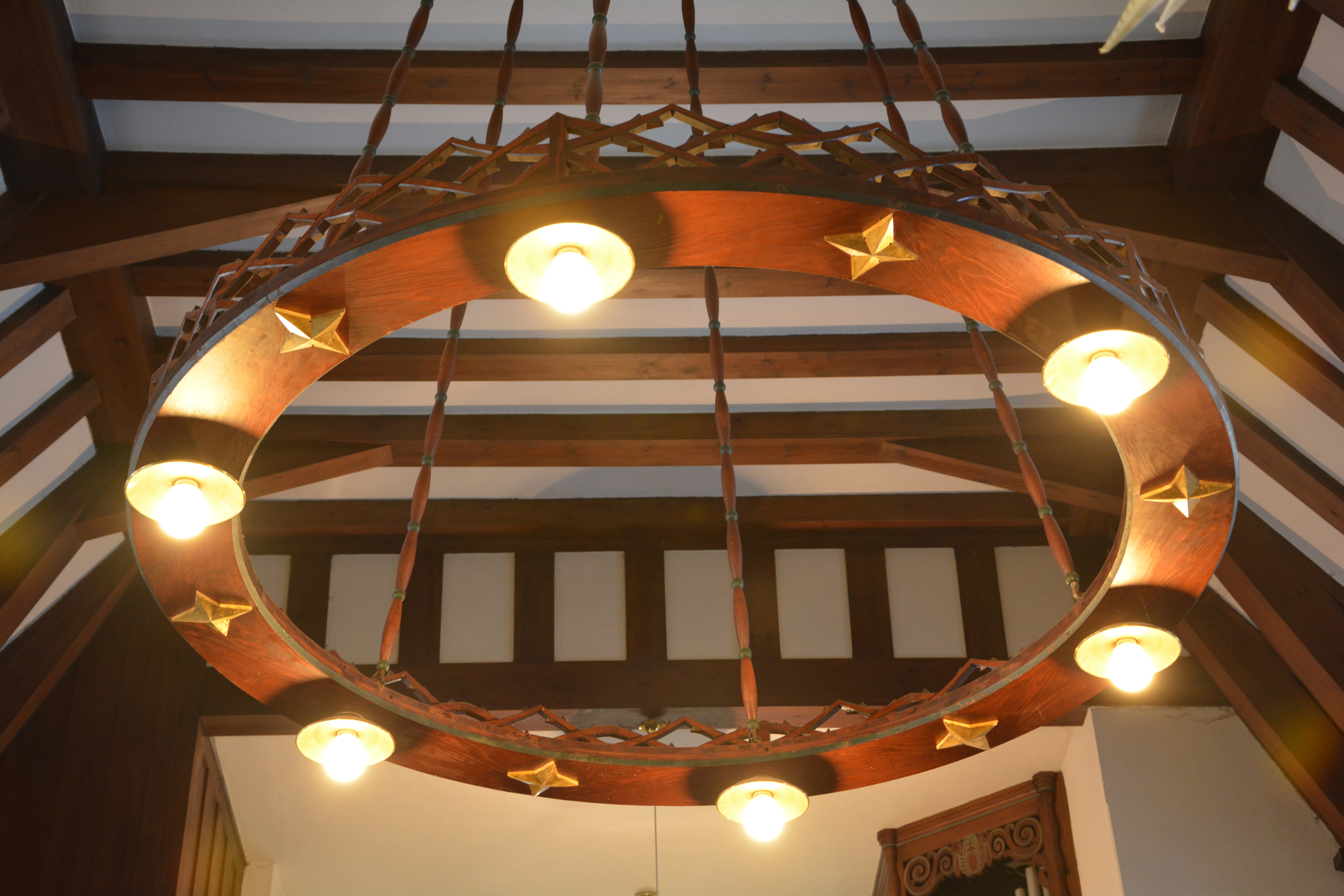 Bergkirche Kurort Kipsdorf, nach einen Entwurf von William Lossow und Max Hans Kühne 1908 erbaut. Schöner geschnitzter Leuchter